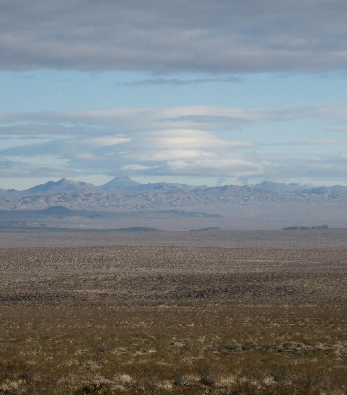 Mojave views from Kramer Hills